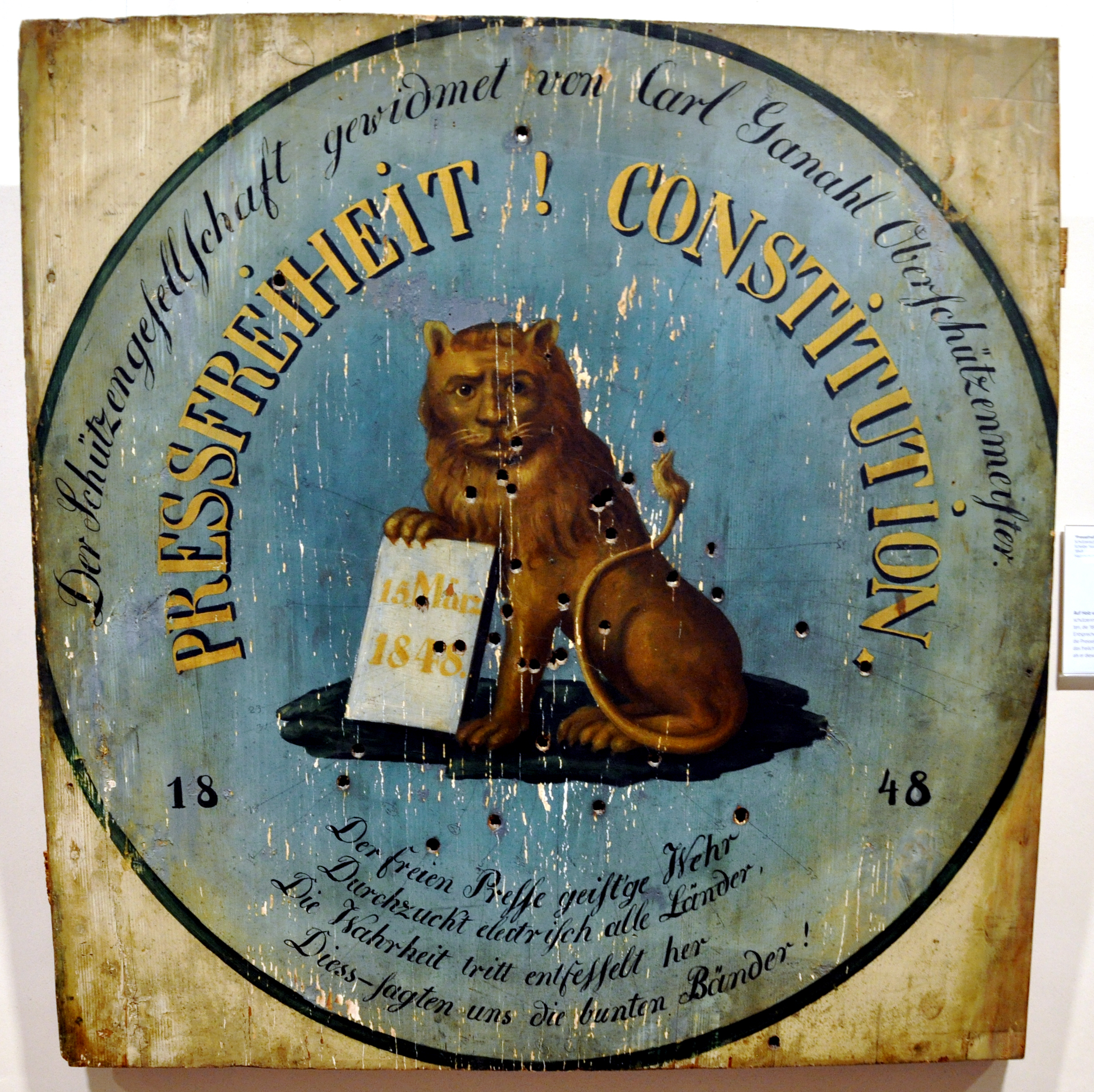 Schützenscheibe "Pressfreiheit! Constitution!", Scheibe Nr. 144, Feldkirch 1848 Bregenz, Vorarlberg Museum, Leihgabe der Hauptschützengilde Feldkirch vorarlberg museum Native namevorarlberg museumLocationBregenz, Vorarlberg, AustriaCoordinates47° 30′ 16″ N, 9° 44′ 48″ E Established1857WebsiteVorarlberg Museum website